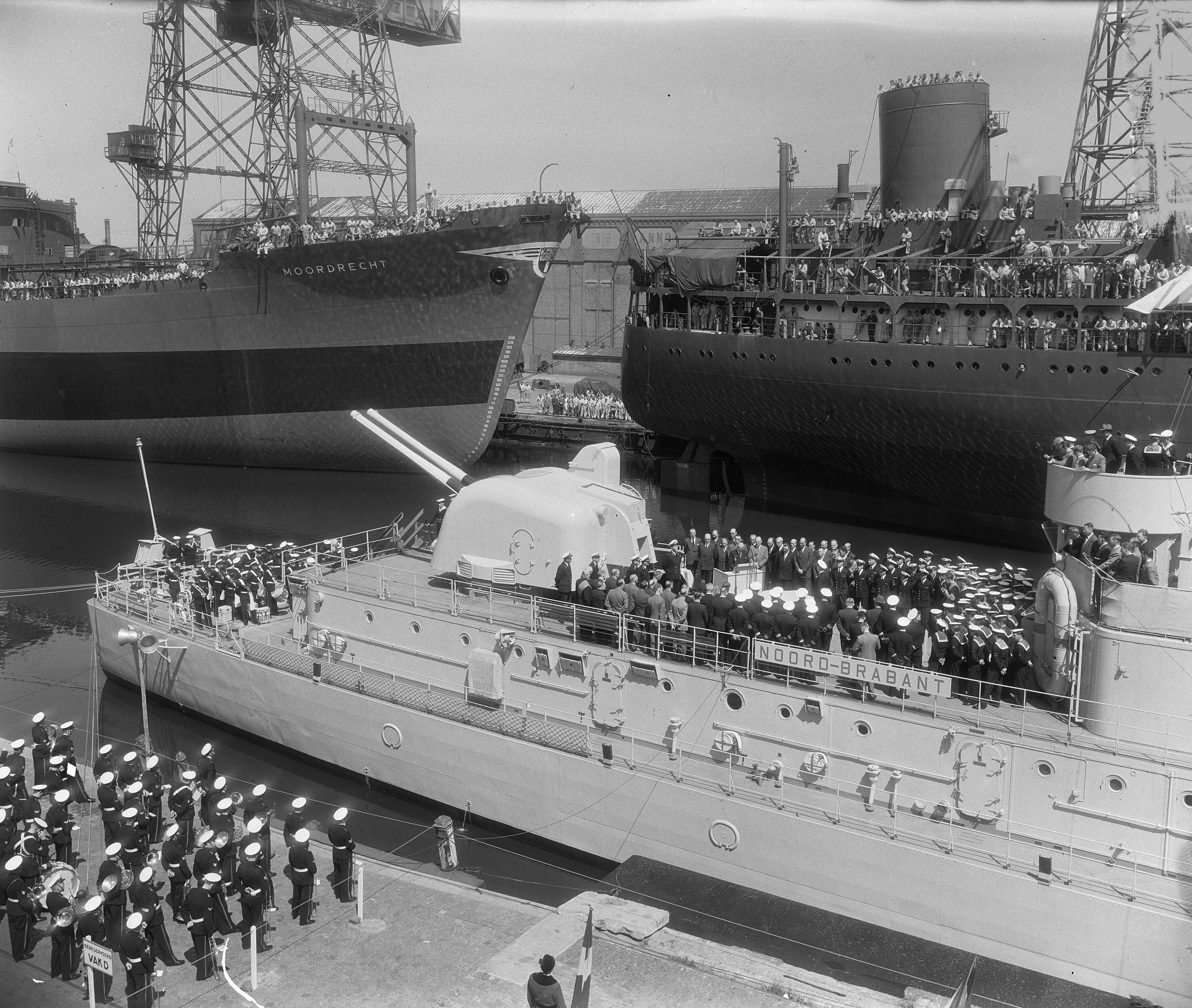 Collectie / Archief : Fotocollectie Anefo Reportage / Serie : [ onbekend ] Beschrijving : Overdracht onderzeebootjager Noord Brabant Vlissingen Datum : 1 juni 1955 Locatie : Vlissingen, Zeeland Trefwoorden : Overdrachten, onderzeebootjagers Fotograaf : Rossem, Wim van / Anefo Auteursrechthebbende : Nationaal Archief Materiaalsoort : Glasnegatief Nummer archiefinventaris : bekijk toegang 2.24.01.09 Bestanddeelnummer : 907-1641